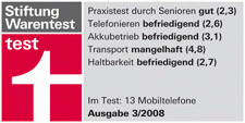 Logo zur Werbung mit Ergebnissen von test der Stiftung Warentest, Querformat, breit